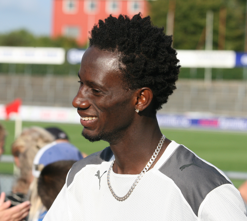 Ebrima Sohna